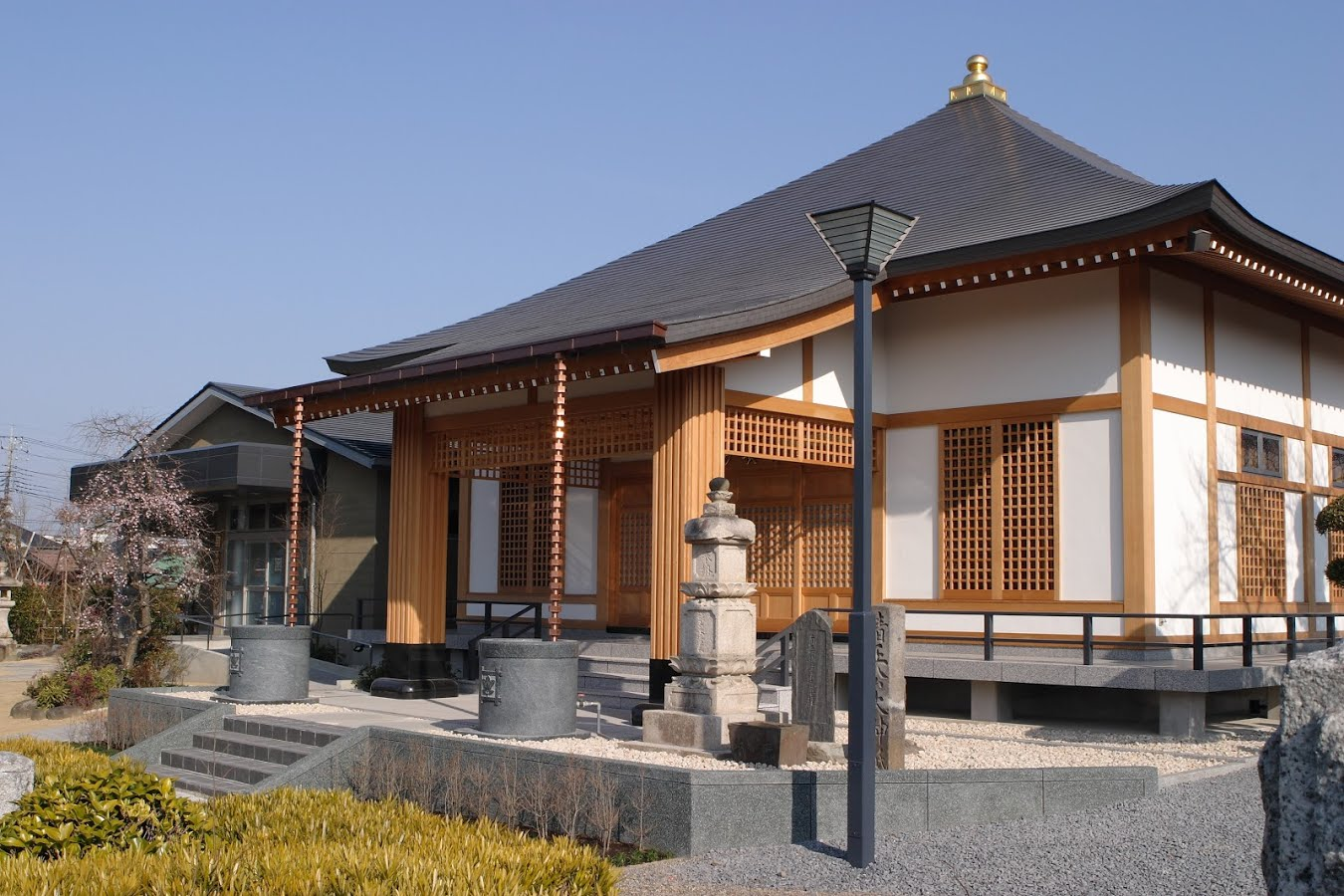 浄国寺 本堂